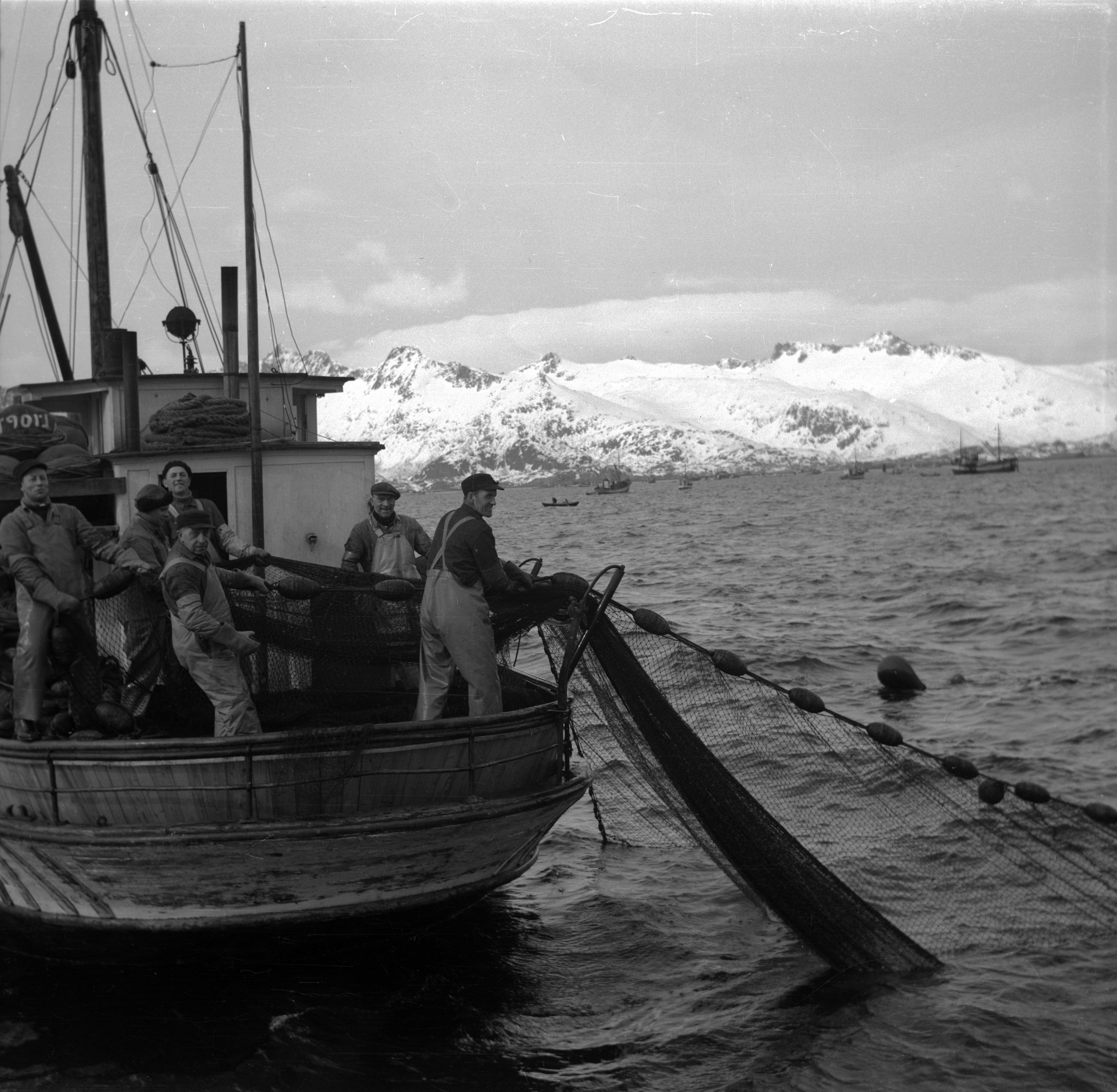 Bildet er hentet fra Nordlandsmuseet bildesamling etter Kanstad. Motivbeskrivelse: Fiske, båtlag Nøkkelord: Fiske Fiskebåter med tilbehør og utrusting Tilbehør og utrustning Organisasjon og fordeling av fiskefangst Motorbåter